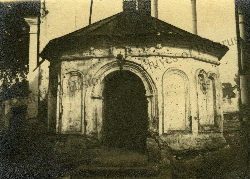 Беларуская (тарашкевіца): Магілёў (Mahiloŭ), вуліца Прачысьценская (vulica Pračyścienskaja). Царква Прачыстай Багародзіцы